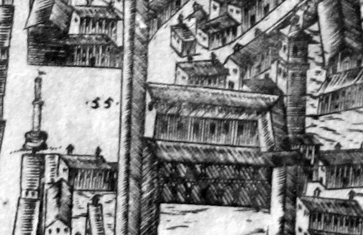 Pianta del buonsignori, dettaglio 055 santa felicita monastero